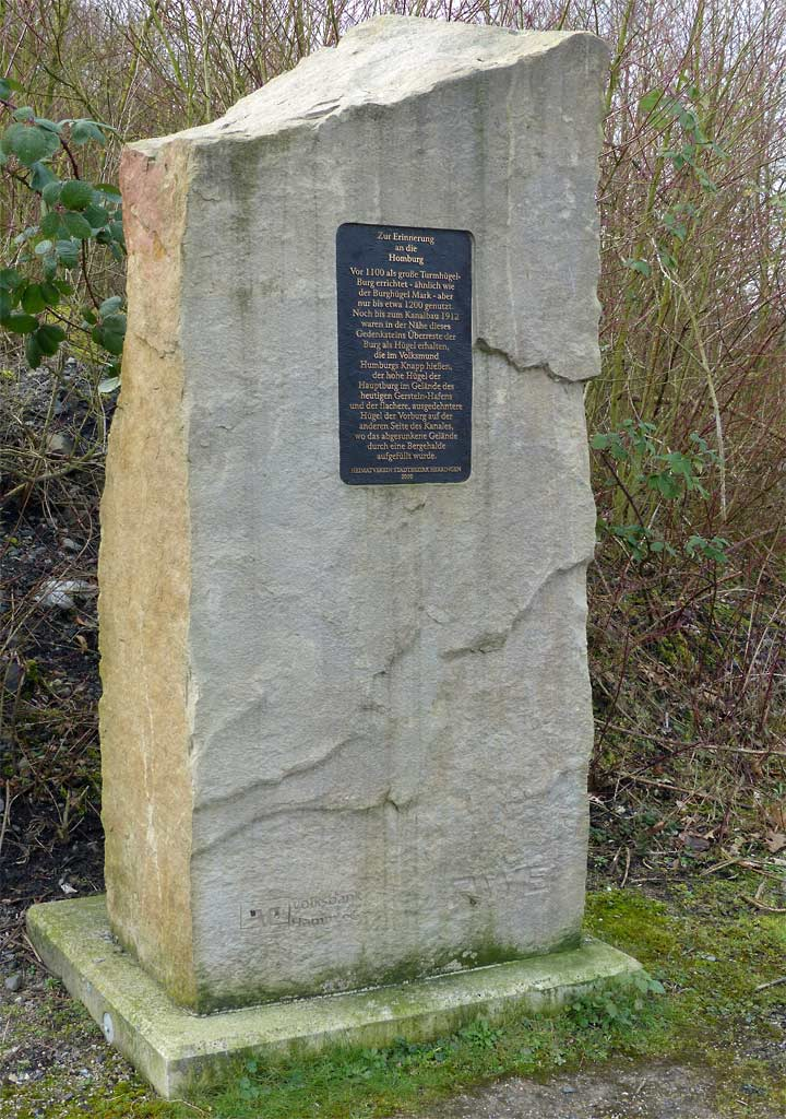 Gedenkstein am Kanal­hafens des VEW Ger­stein Kraftwerks